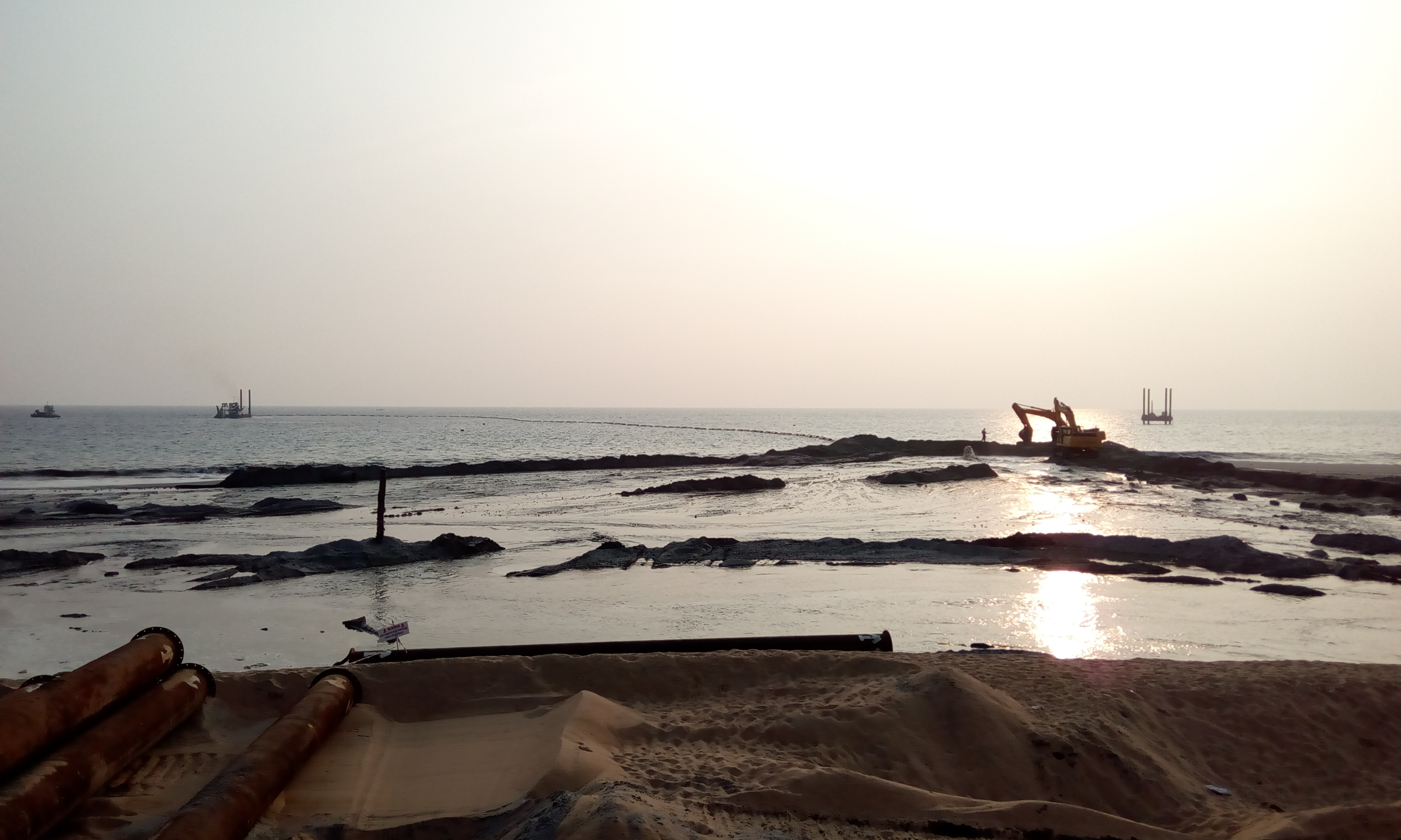 Vizhinjam Port dredging